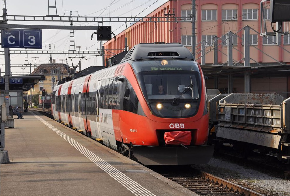 Triebzug der ÖBB-Baureihe 4024 im Schweizer Grenzbahnhof St. Margrethen